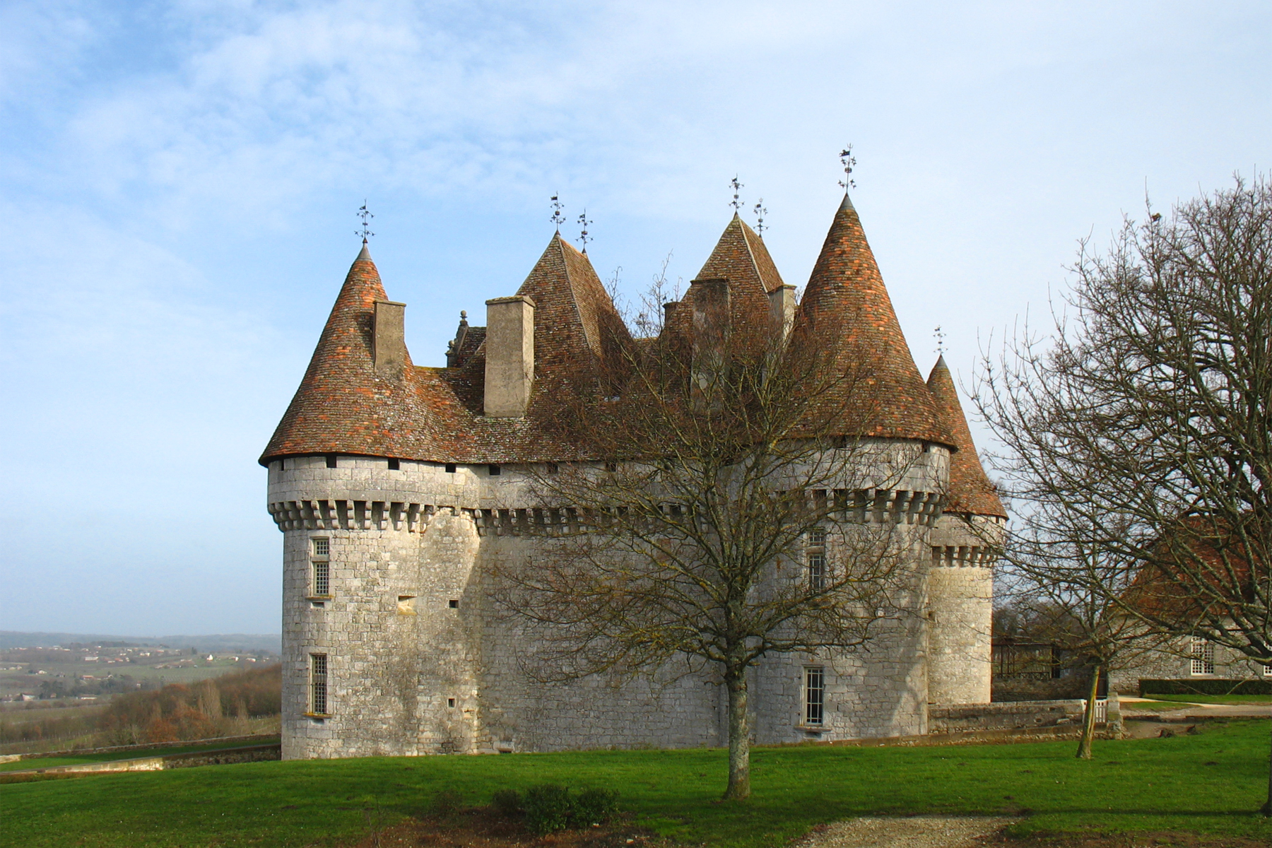 Le château de Monbazillac (Dordogne) France